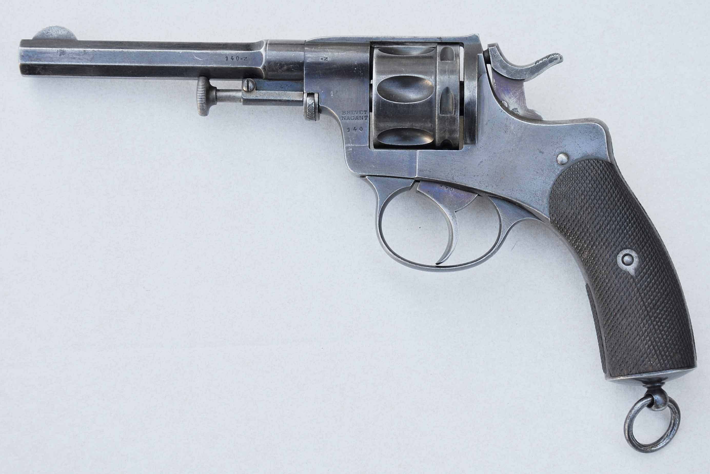 9 mm selvspent Nagant revolver M/1883, 150 slike ble innkjøpt i 1885